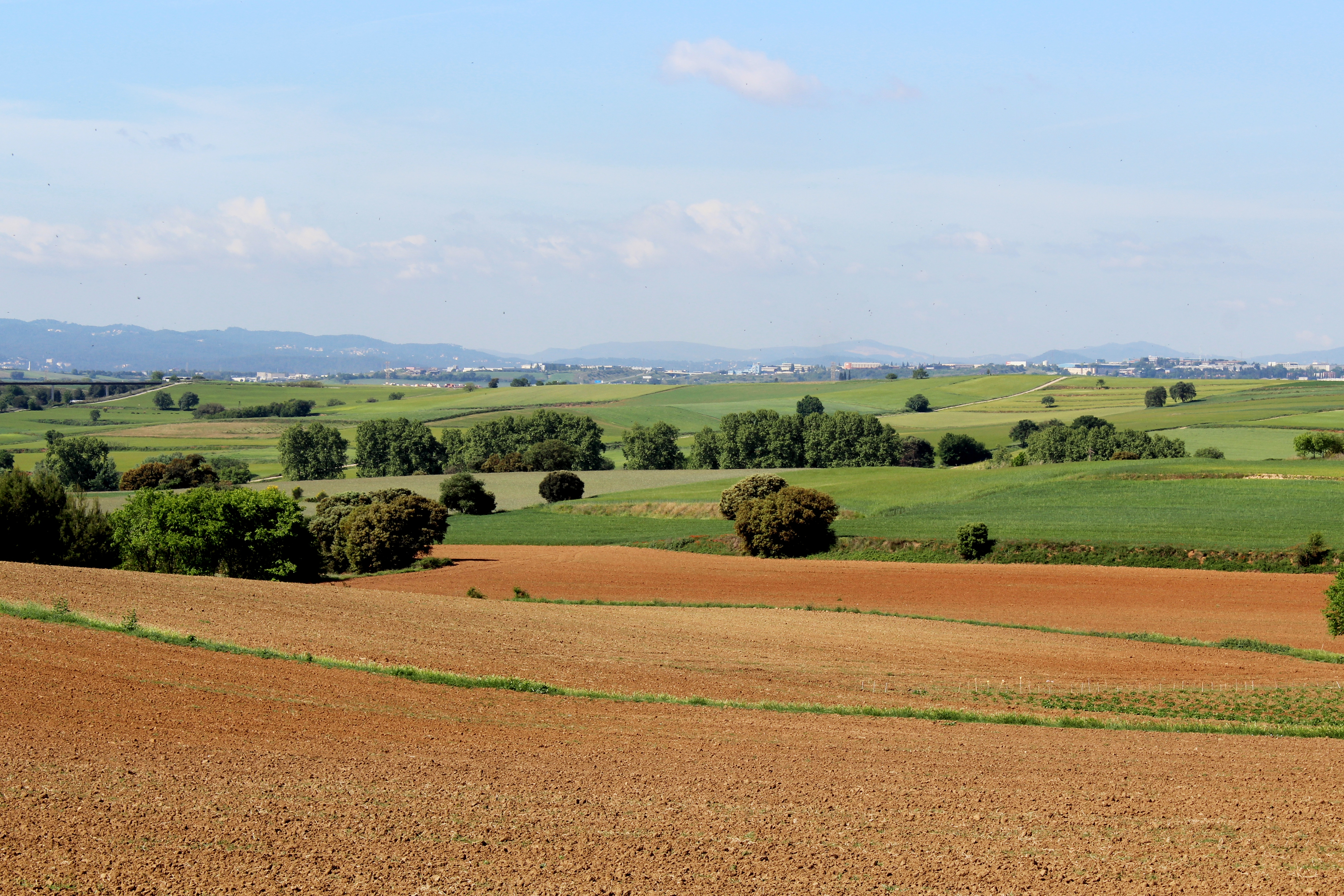 Parc Natural Gallecs This is a a photo of a natural area in Catalonia, Spain, with id: ES510277